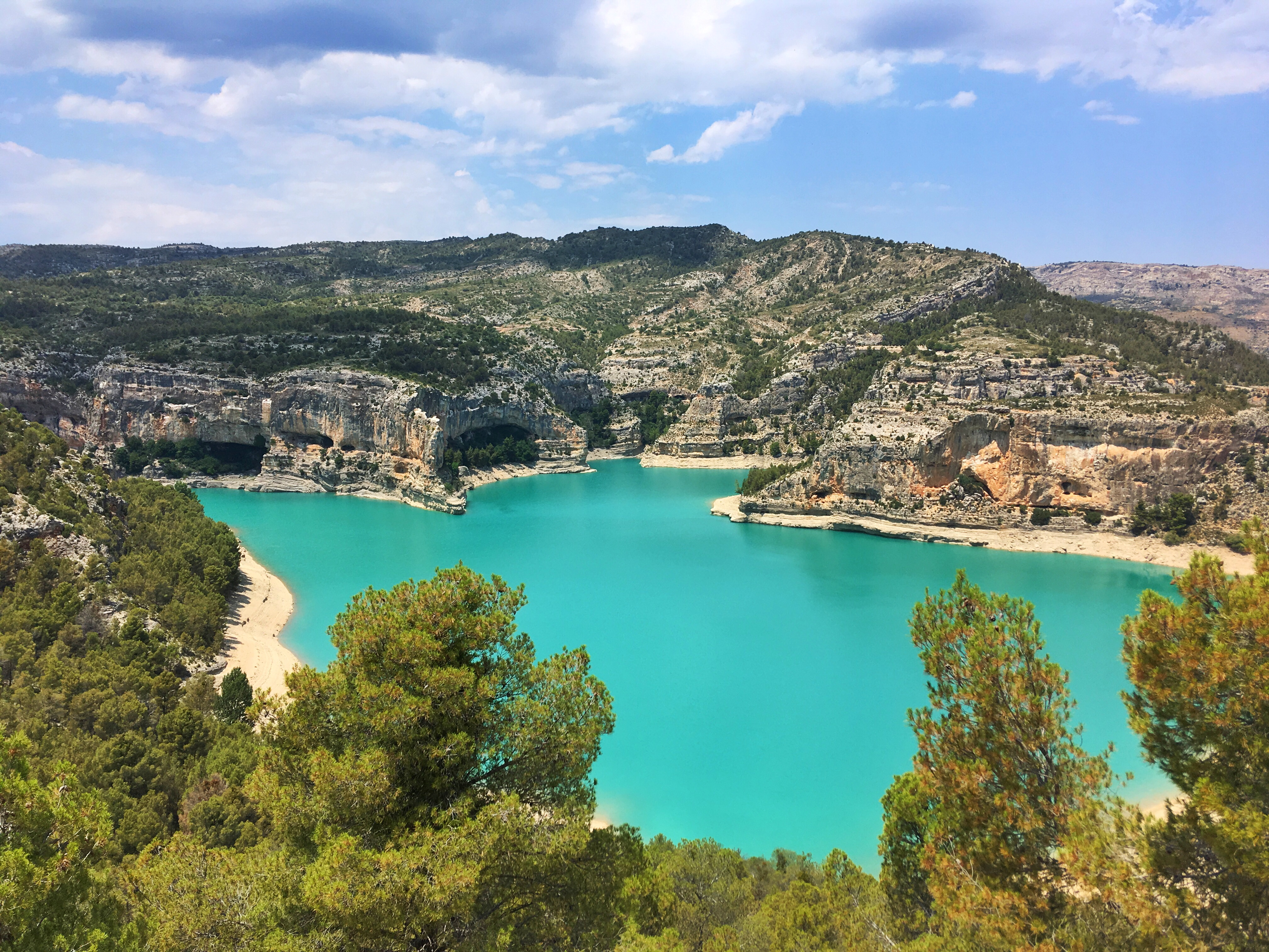 Santolea #Maestrazgo